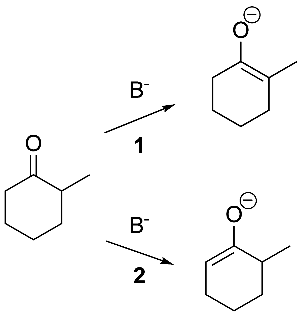 Regiocontrolled enolate generation